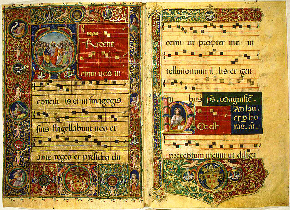 Saltarello, partition médiévale